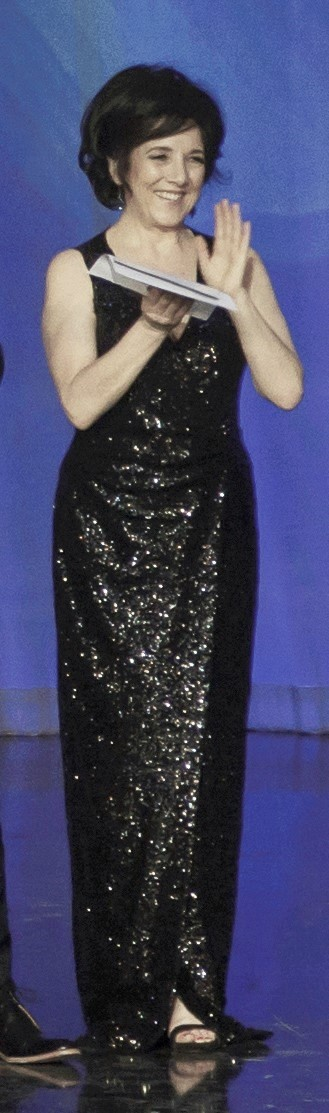 El discurso de la actriz al recibir el premio dio mucho que hablar, ya que subió al escenario portando un cartel que llevaba escrita la frase "Libertad para Belén". Y al hablar dijo: "Sin libertad no somos nada".La joven fue detenida en marzo de 2014 y en mayo del 2016 se dictaminó su sentencia: prisión por el delito de "homicidio por circunstancias extraordinarias de atenuación".Desde entonces, distintas organizaciones sociales se han movilizado por esta sentencia reclamando la libertad de Belén (de quien no se conoce su nombre real), argumentando que se trata de un caso de "violencia institucional".Ref